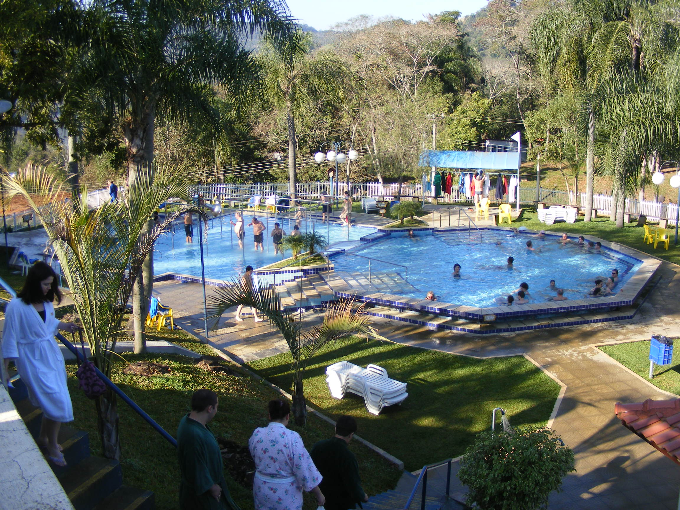 Uma das diversas piscinas que integram as Termas de Piratuba, no meio-oeste catarinense